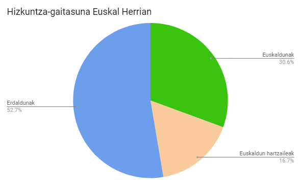 Euskal Herriko hizkuntza-gaitasuna, EAEko datuak 2011ko ikerketa soziolinguistikotik atera dira, Nafarroako Foru Erkidegokoak 2016koak dira, Ipar Euskal Herrikoak bezala.